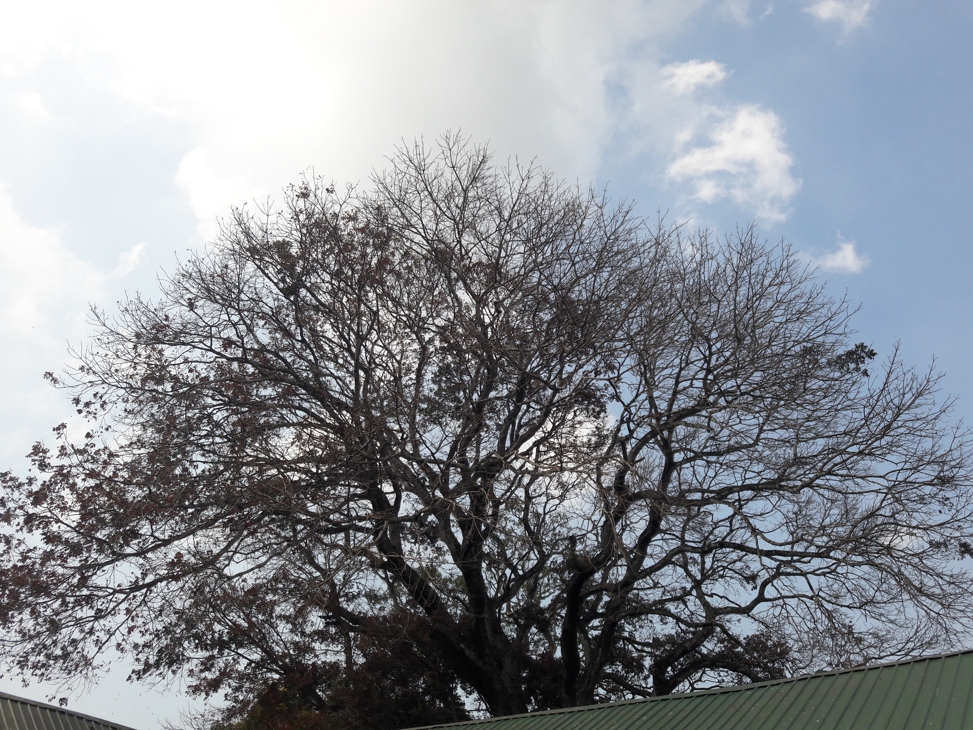 ഗവ. മോഡൽ ബോയ്സ് എച്ച്.എസ്.എസ്, തൈക്കാട് - ലെ 300 വര്‍ഷം പ്രായമായ ഒരു മഹാഗണി വൃക്ഷം.Mahagany tree ശാസ്ത്രീയ നാമം Swietenia mahagoni കുടുംബം Meliaceae.